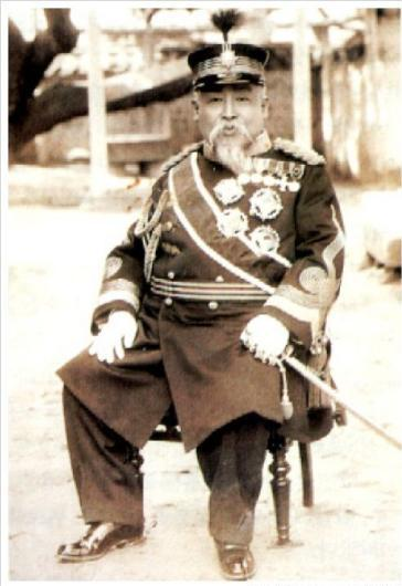 完興君･興親王の軍服